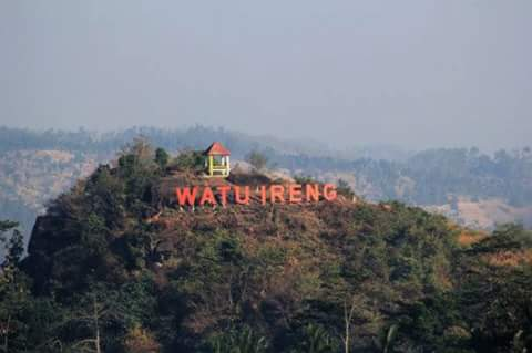 Watu Ireng